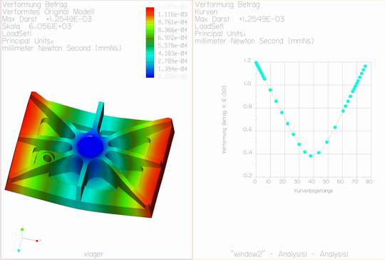 Strukturanalyse (FEM-Simulation)